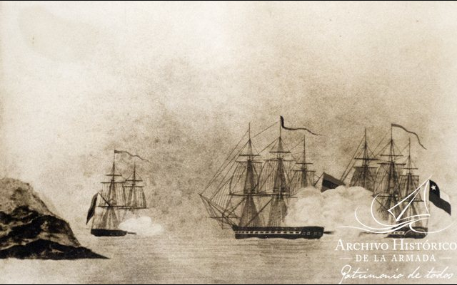 Lautaro, Esmeralda, Pezuela, 1818 en Valparaíso: Fragata chilena Lautaro, al mando del comandante George O’Brien, atacando a los buques españoles que bloquean Valparaíso, 27 de marzo de 1818. En la escena se observa a dicha fragata atacando e intentando aproximarse a la fragata española Esmeralda, a la que abordó y estuvo a punto de tomar. Esta captura fracasó y el comandante O’Brien perdió la vida en el intento, pero este combate tuvo el efecto de levantar el bloqueo de Valparaíso y hacer perder a los españoles su espíritu ofensivo. En segundo plano, hacia la izquierda de la imagen, se observa al bergantín español Pezuela. Reproducción de una ilustración de la época de autor desconocido, de origen probablemente inglés, como lo denota la explicación de la misma (fuera de la imagen). Fuente: Colección Museo Marítimo Nacional.